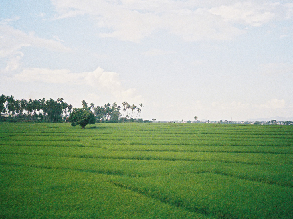 പാലക്കടുള്ള സമൃധമായ നെല്‍വയലുകള്‍ക്കിടയിലൂടെ നടത്തിയ യാത്രയ്ക്കിടയില്‍ പകര്‍ത്തിയത്‌. ചിത്രം പകര്‍ത്തിയത്‌ ഹേമന്ത്‌ രാമചന്ദ്രന്‍. ജൂണ്‍ 2005 തഴച്ചു വളര്‍ന്നു നില്‍ക്കുന്ന ഇവ ഒരു ഗൃഹാതുര ഓര്‍മയായി തീരാതിരിയ്ക്കാന്‍ നമുക്ക്‌ ശ്രമിയ്ക്കാം.